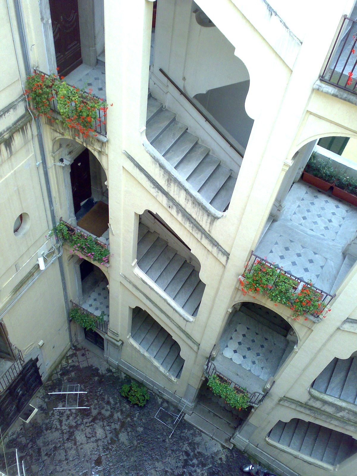 Scalone ad ali di falco del Palazzo Genovese in Salerno